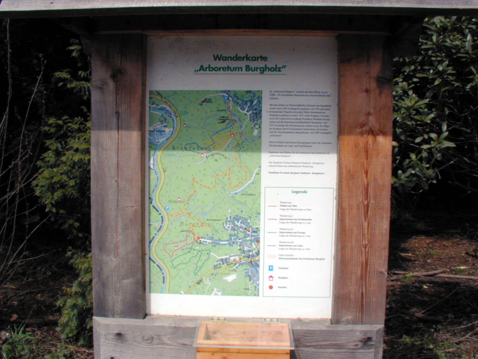 Wanderkarte der Arboretumswege im Burgholz, Wuppertal